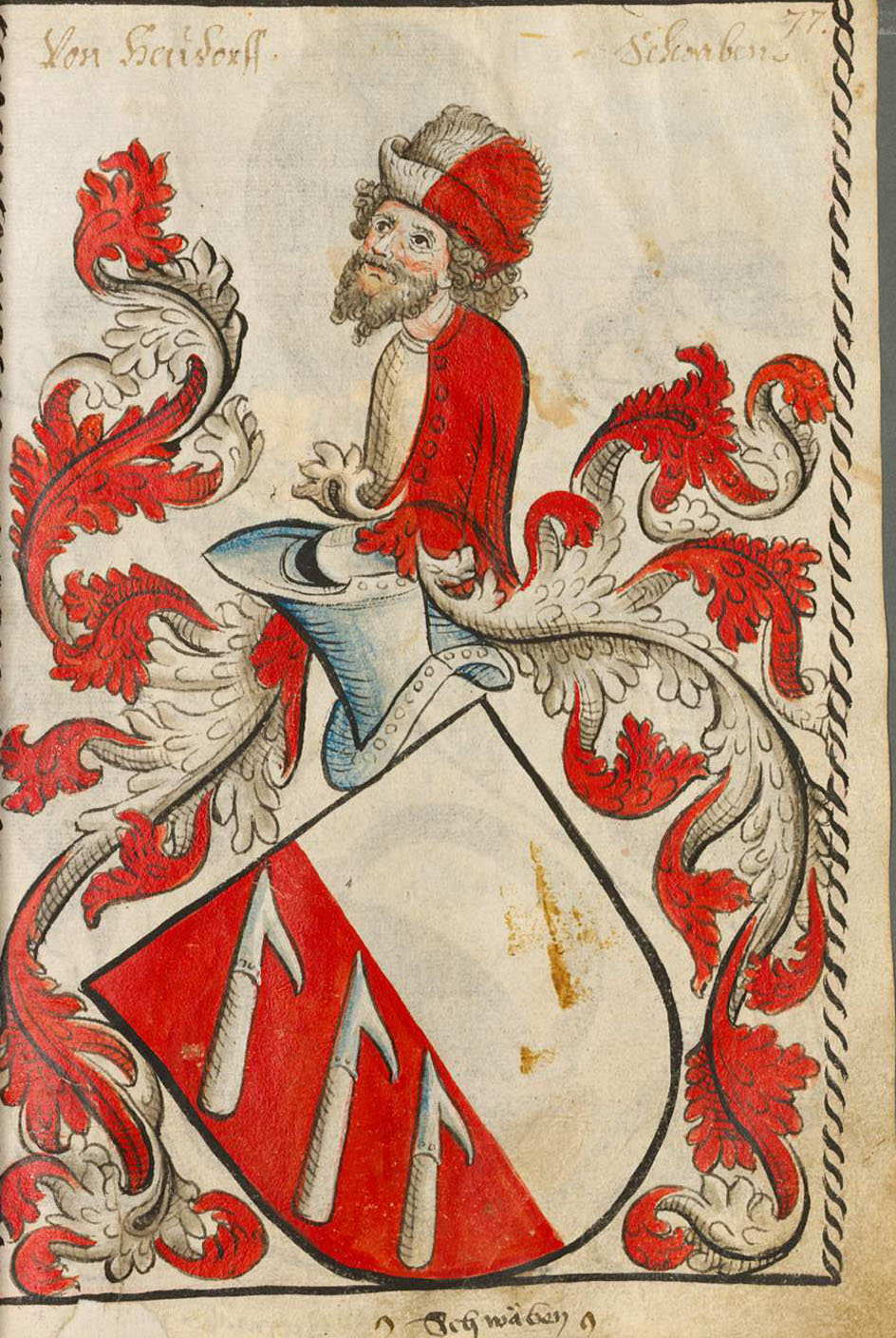 Scheibler'sches Wappenbuch, älterer Teil; Seite 77 Von Heudorff Schwaben